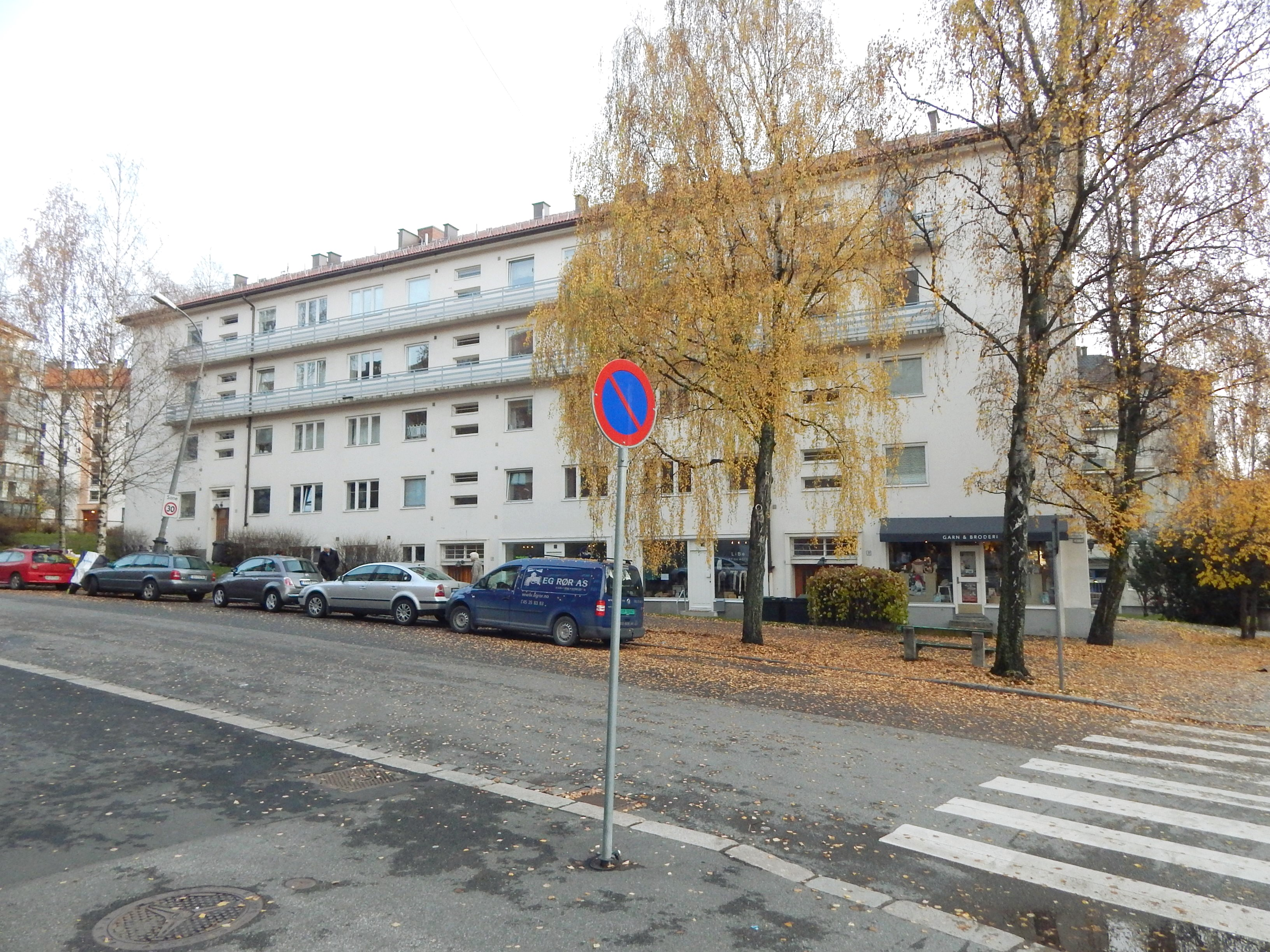 Gjøvikgata